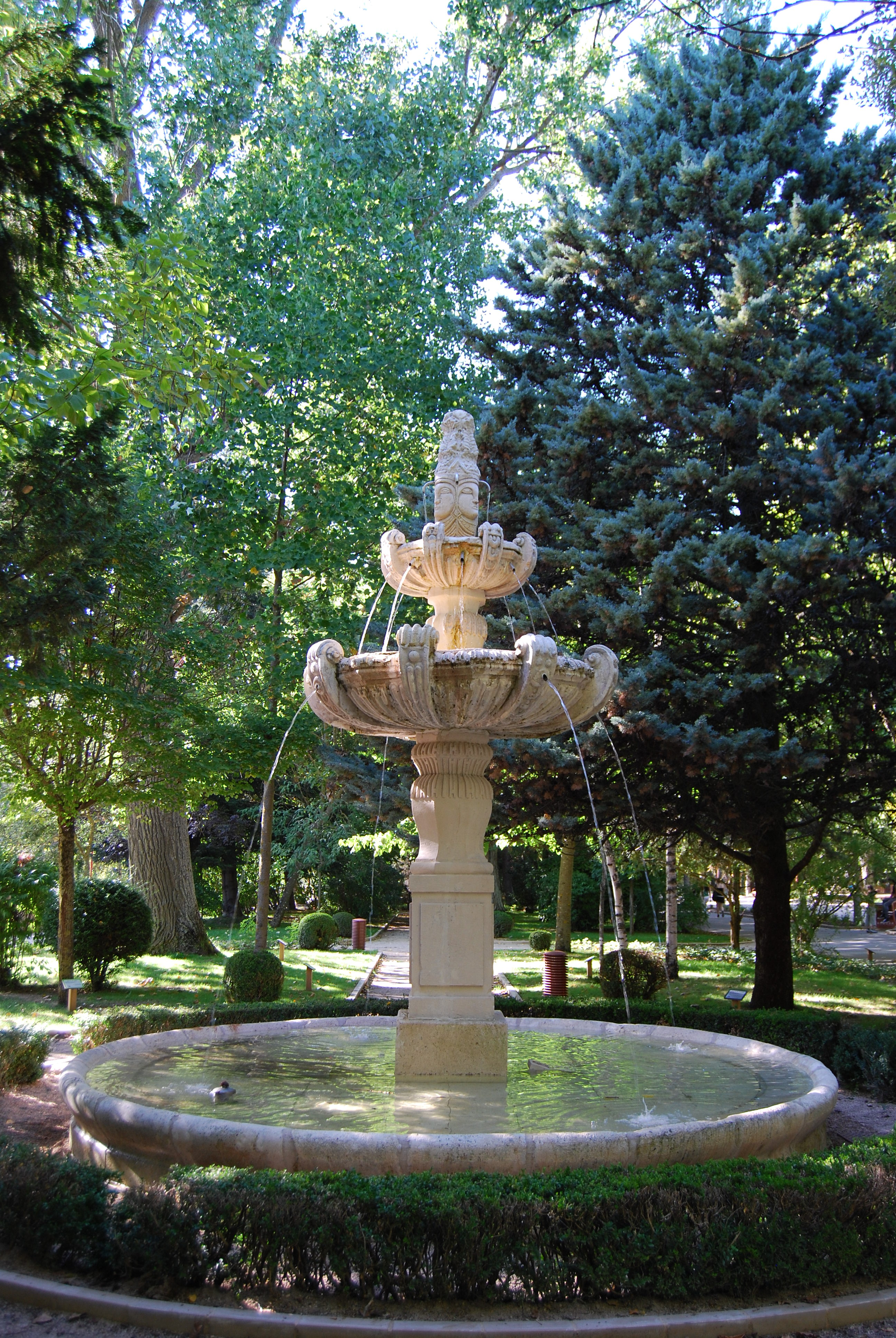 Fuente procedente del Monasterio de San Pedro de Arlanza (Burgos) e instalada en el Paseo de la Isla de Burgos.